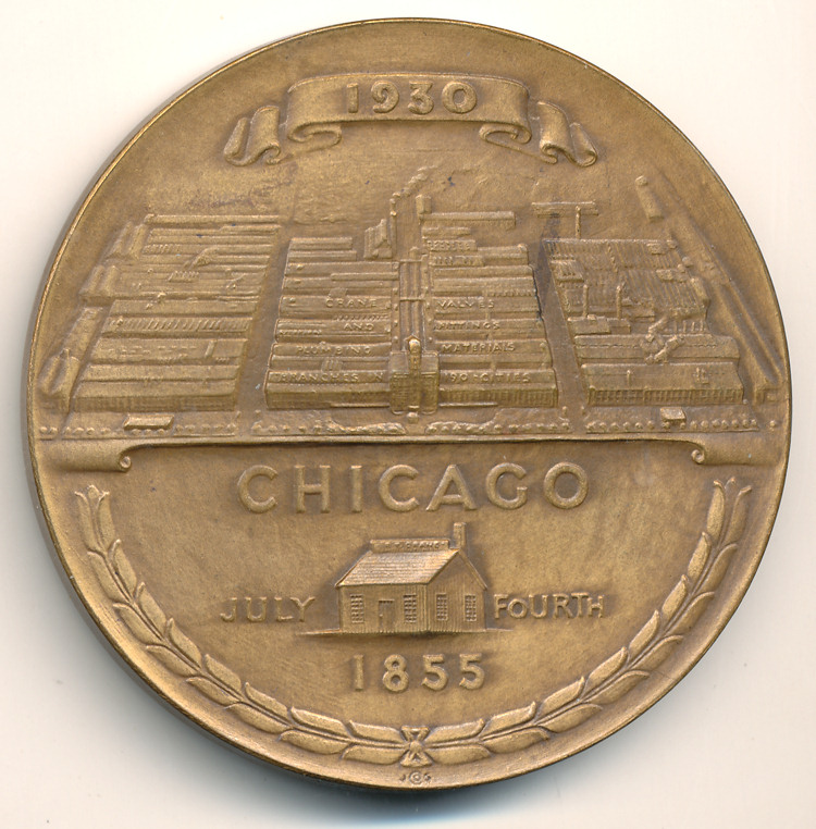 Médaille à l'effigie de Richard T. Crane, fondateur de RT Crane & Bro à Chicago. Médaille 63mm bronze. 75e anniversaire 1930